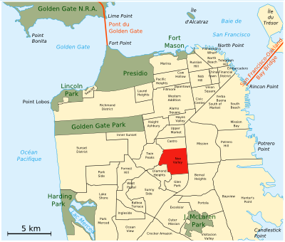 Carte de situation de Noe Valley, San Francisco, Californie